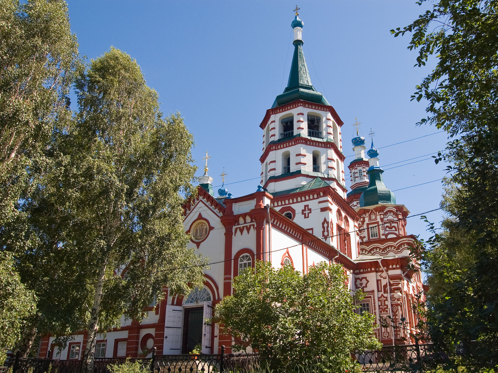 Церковь Воздвижения Креста Господня (Крестовоздвиженская) (Иркутская область, Иркутск, Седова улица, 1-5 (Коммунаров улица, 12))